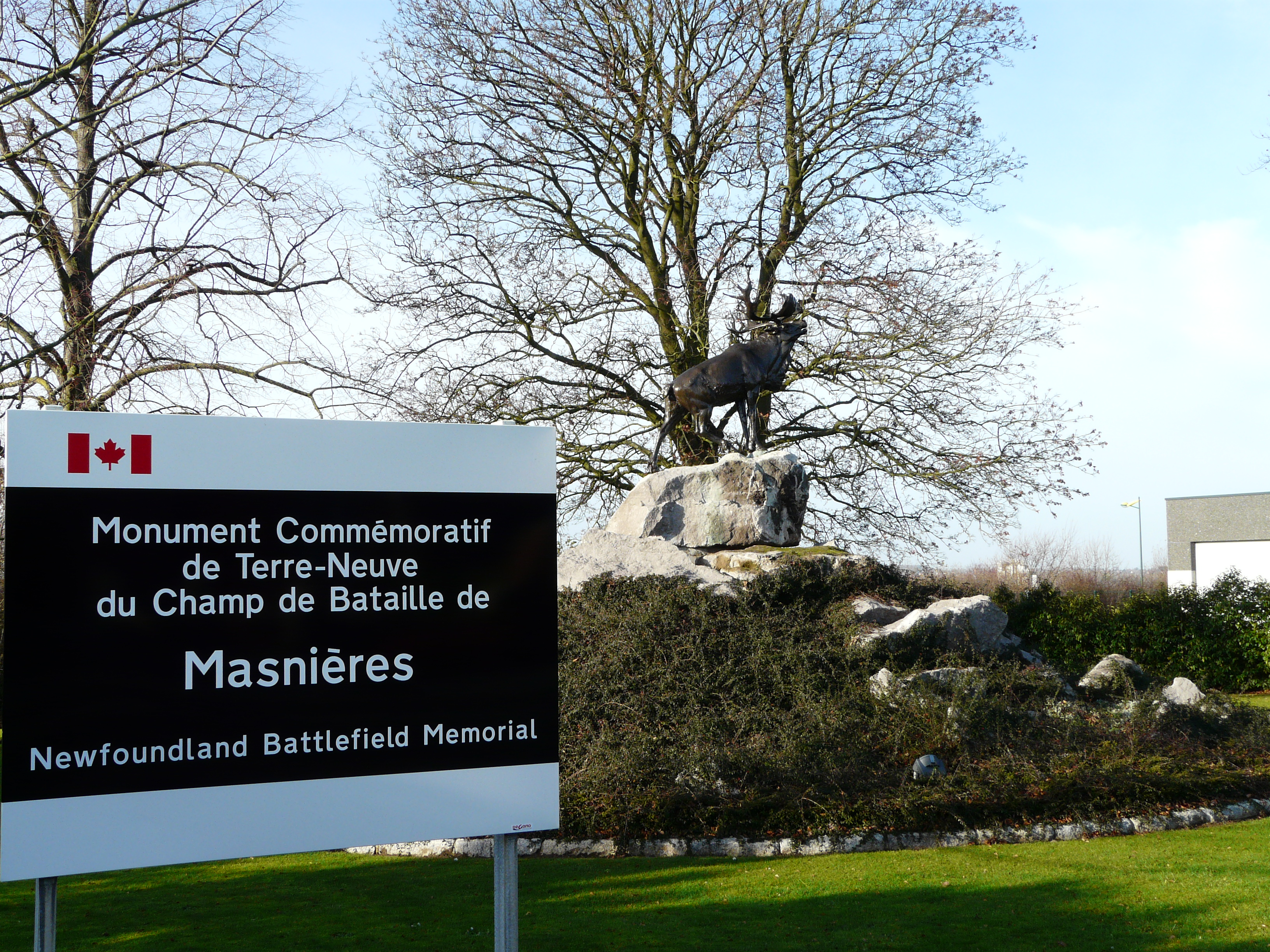 Le caribou : monument commémoratif de Terre-Neuve du champ de bataille de Masnières